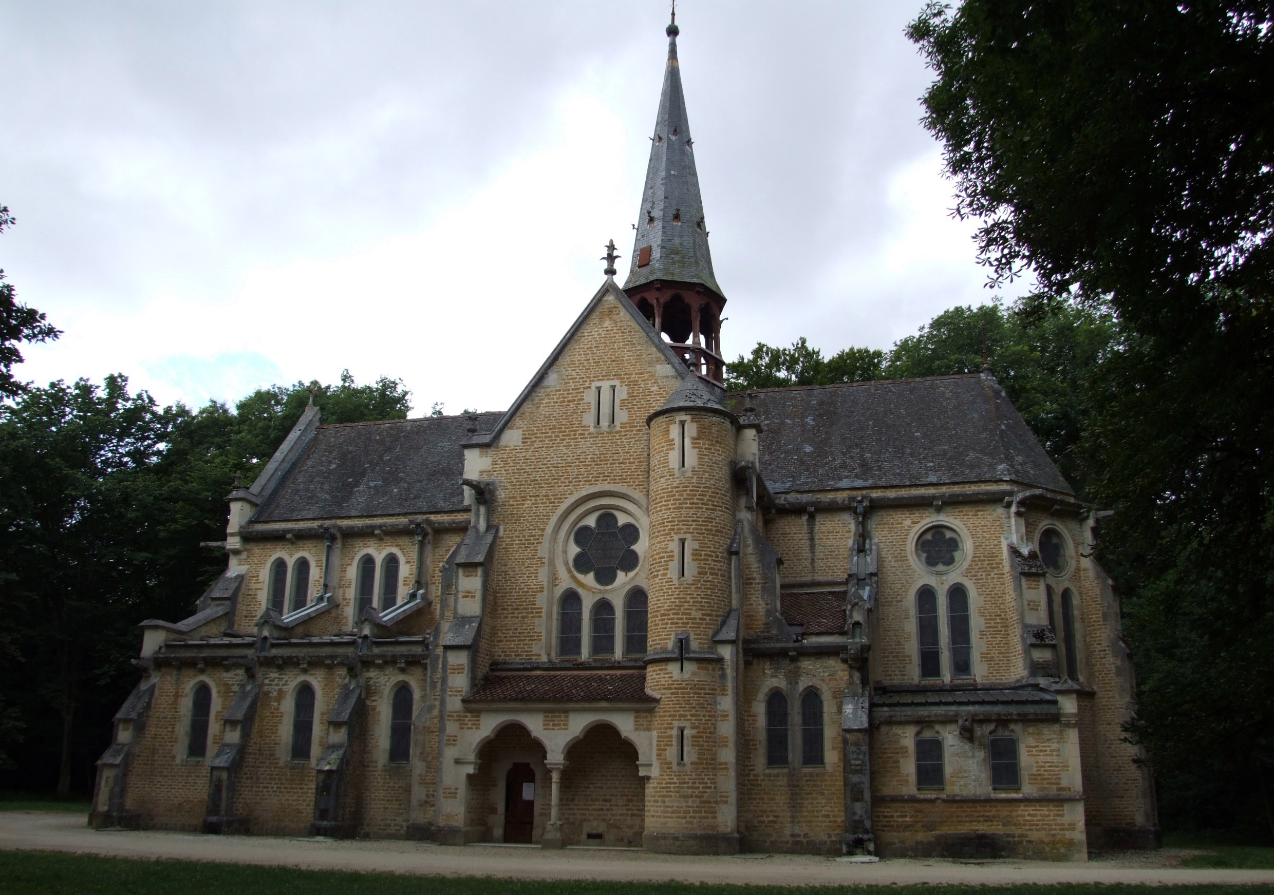 Église Notre-Dame du Chêne, Bar-sur-Seine, Aube, Champagne-Ardennes, FRANCE